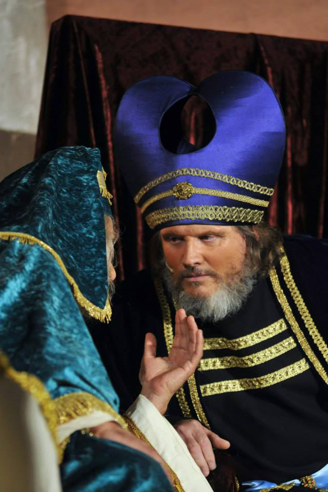 Sacerdoti